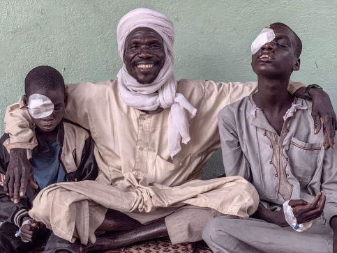 AFAB 2019